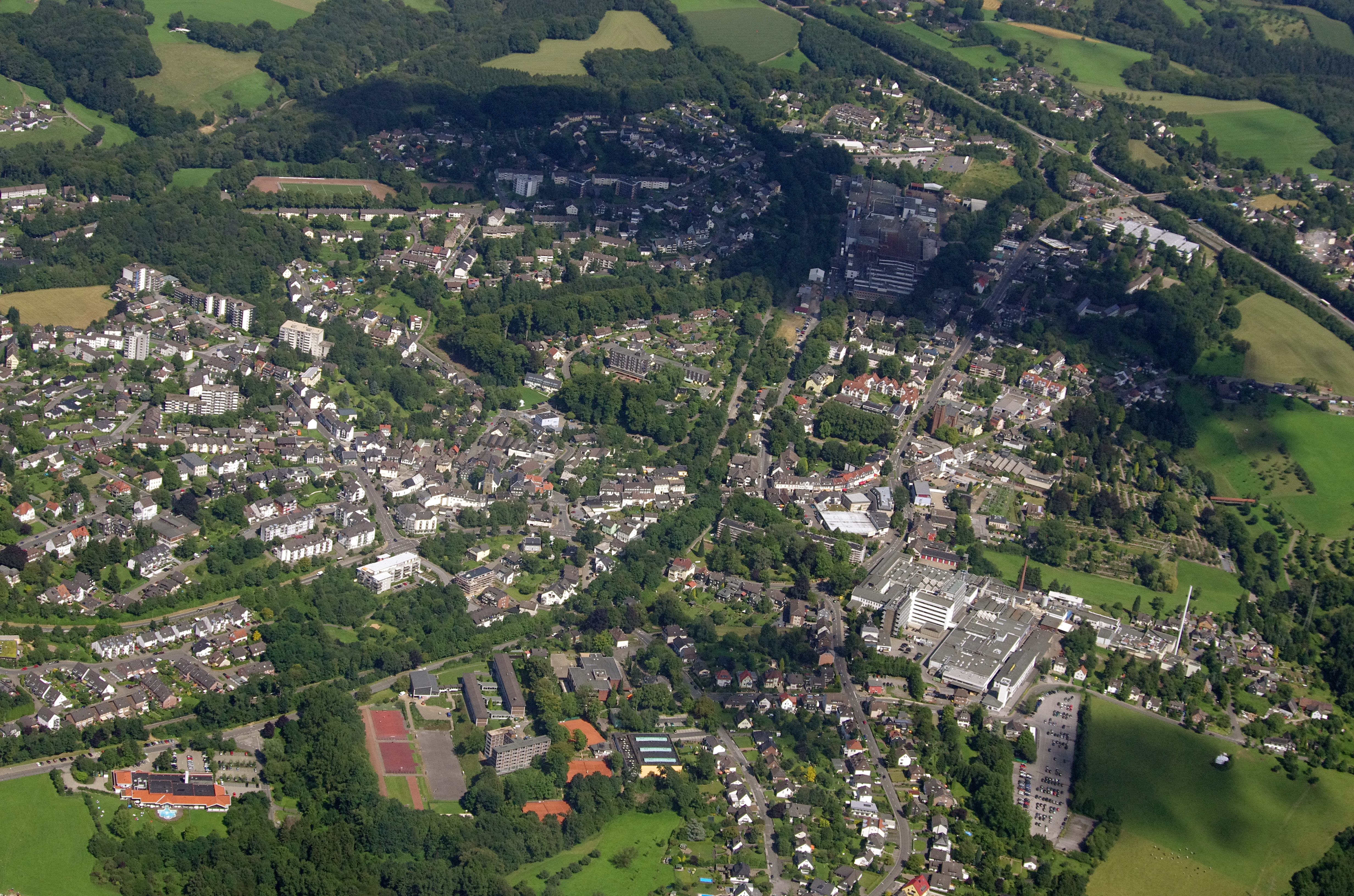 Luftaufnahme von Burscheid aus südwestlicher Richtung